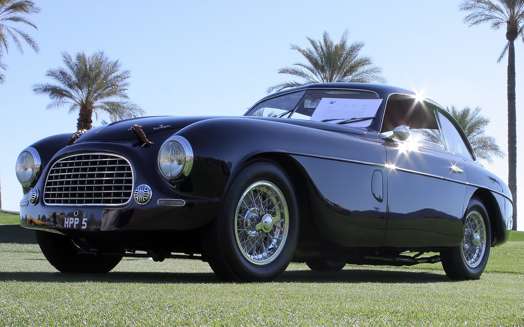 2011 Desert Classic, La Quinta, CA